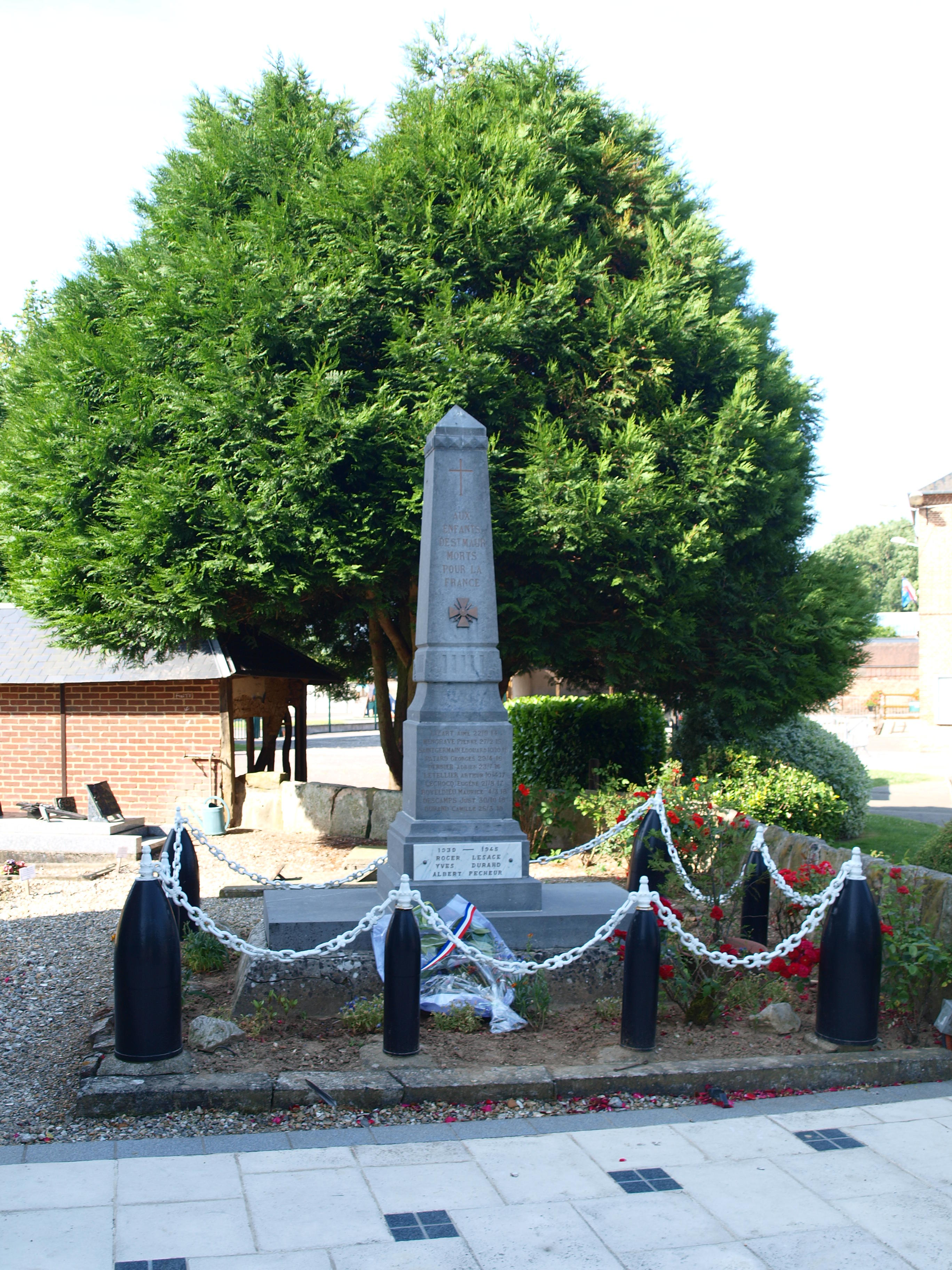 Saint-Maure (Oise, France) ; monument aux morts.